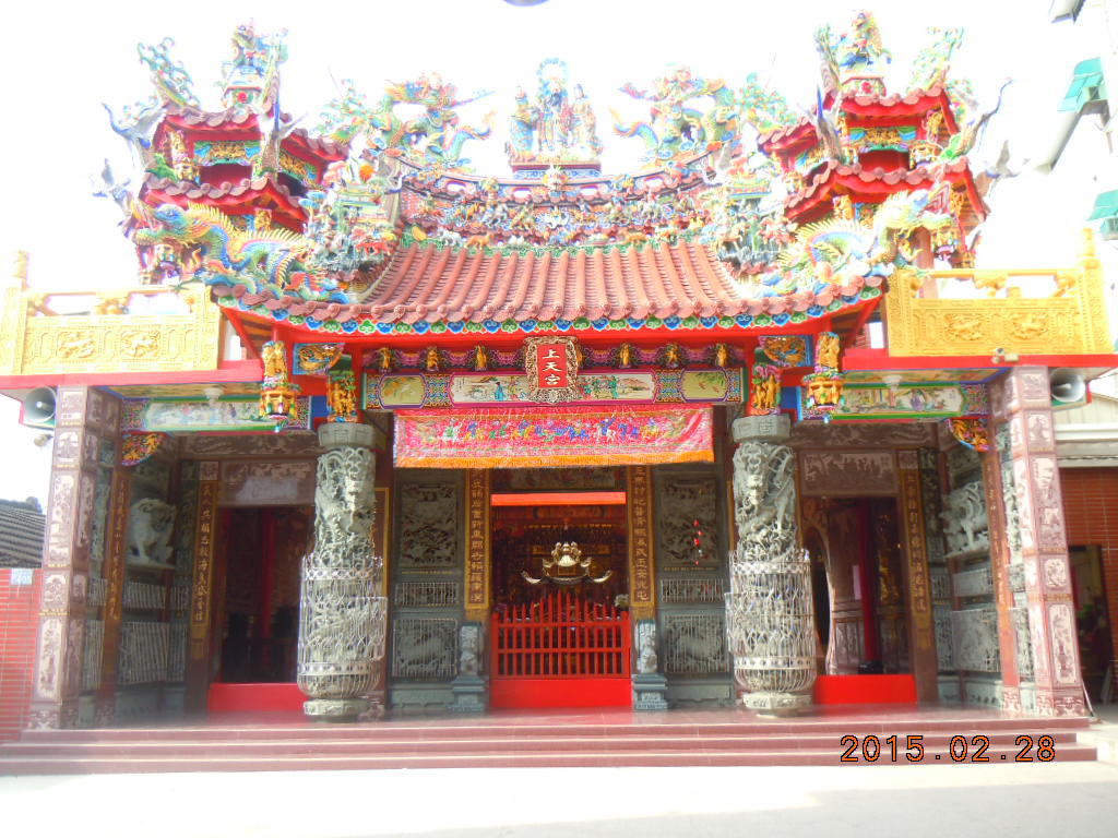 北屯上天宮的所在地:臺中市北屯區太原路三段。